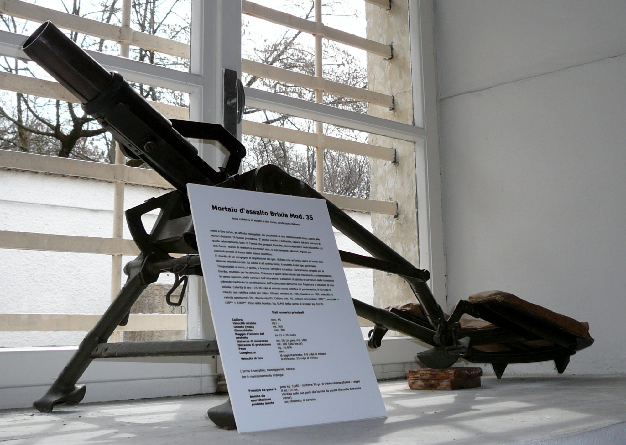 Mortaio Brixia Mod. 35 al Museo degli Alpini a Trento